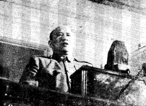 中文（台灣）: 第一屆國民大會專輯圖片